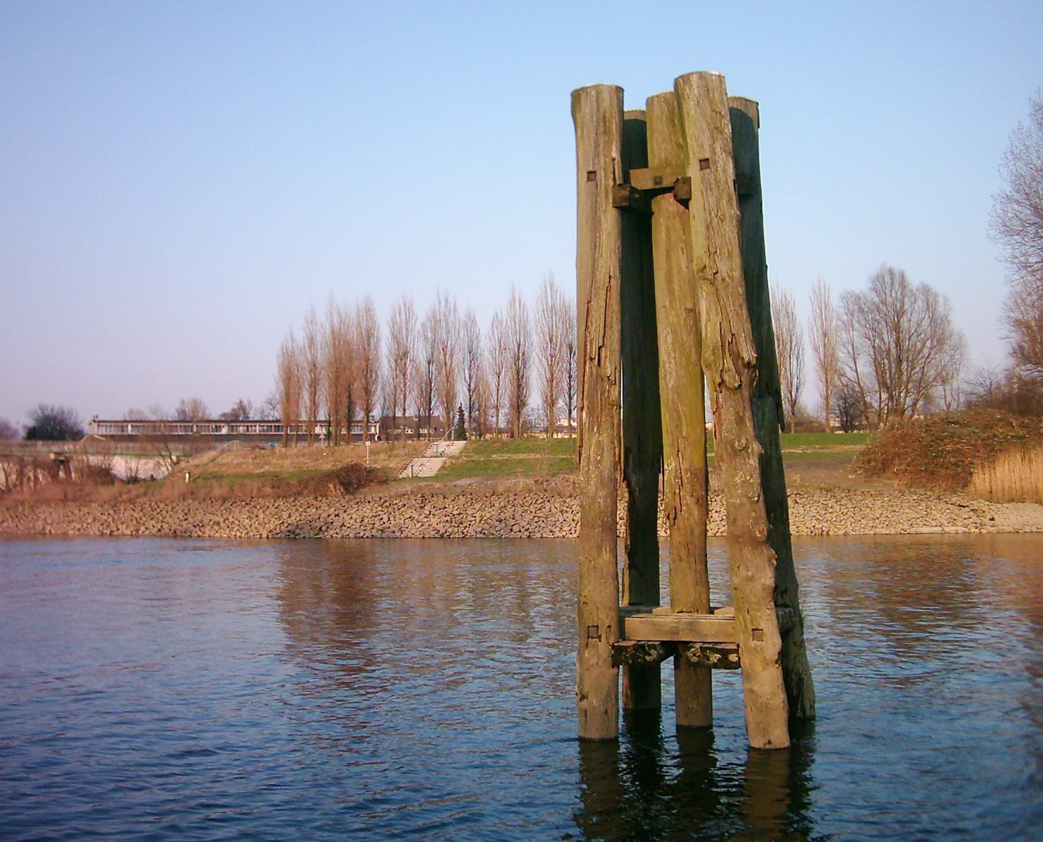 Dalbe am Oberhafenkanal, Hamburg-Rothenburgsort.